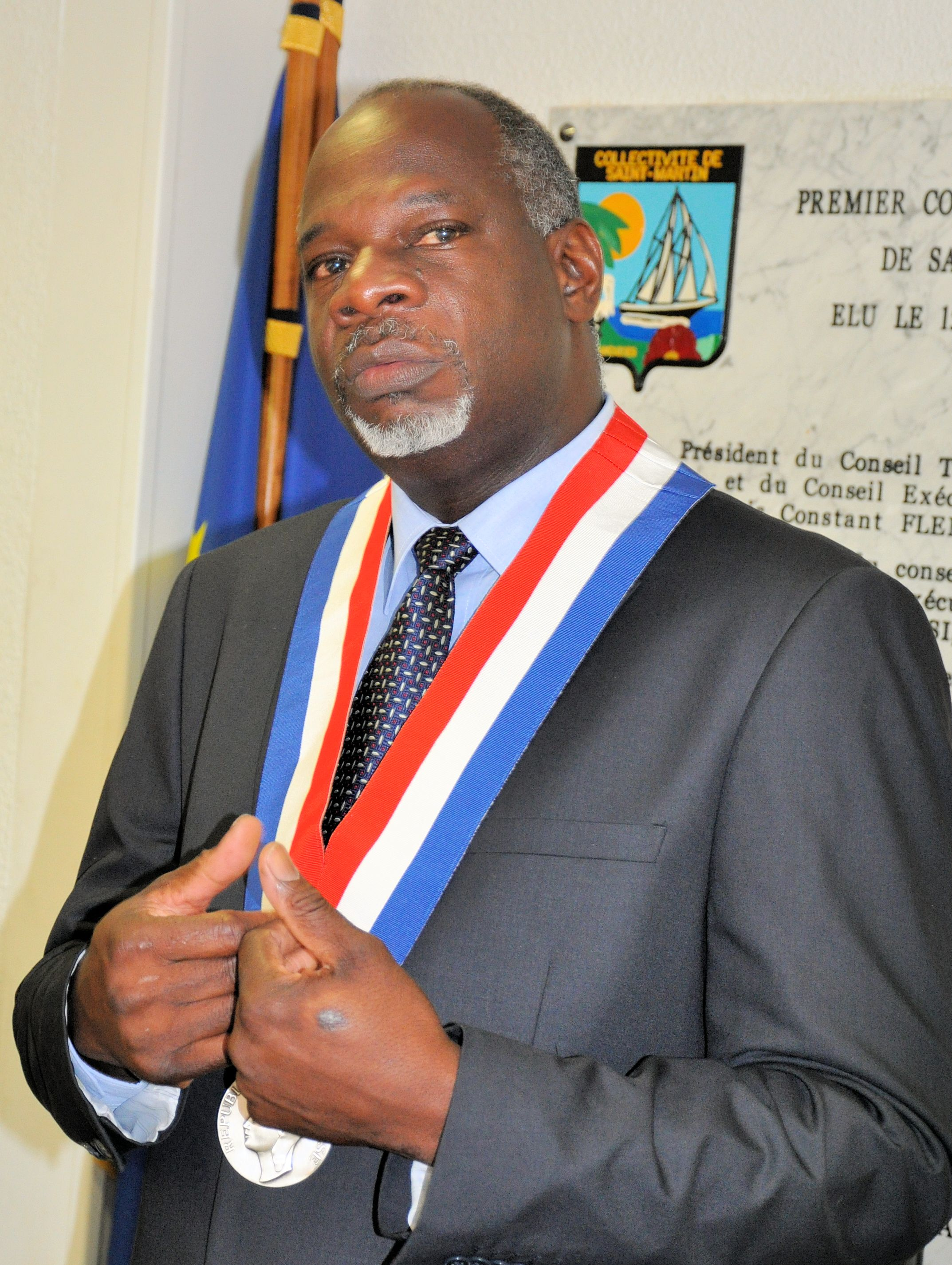 Guillaume Arnell